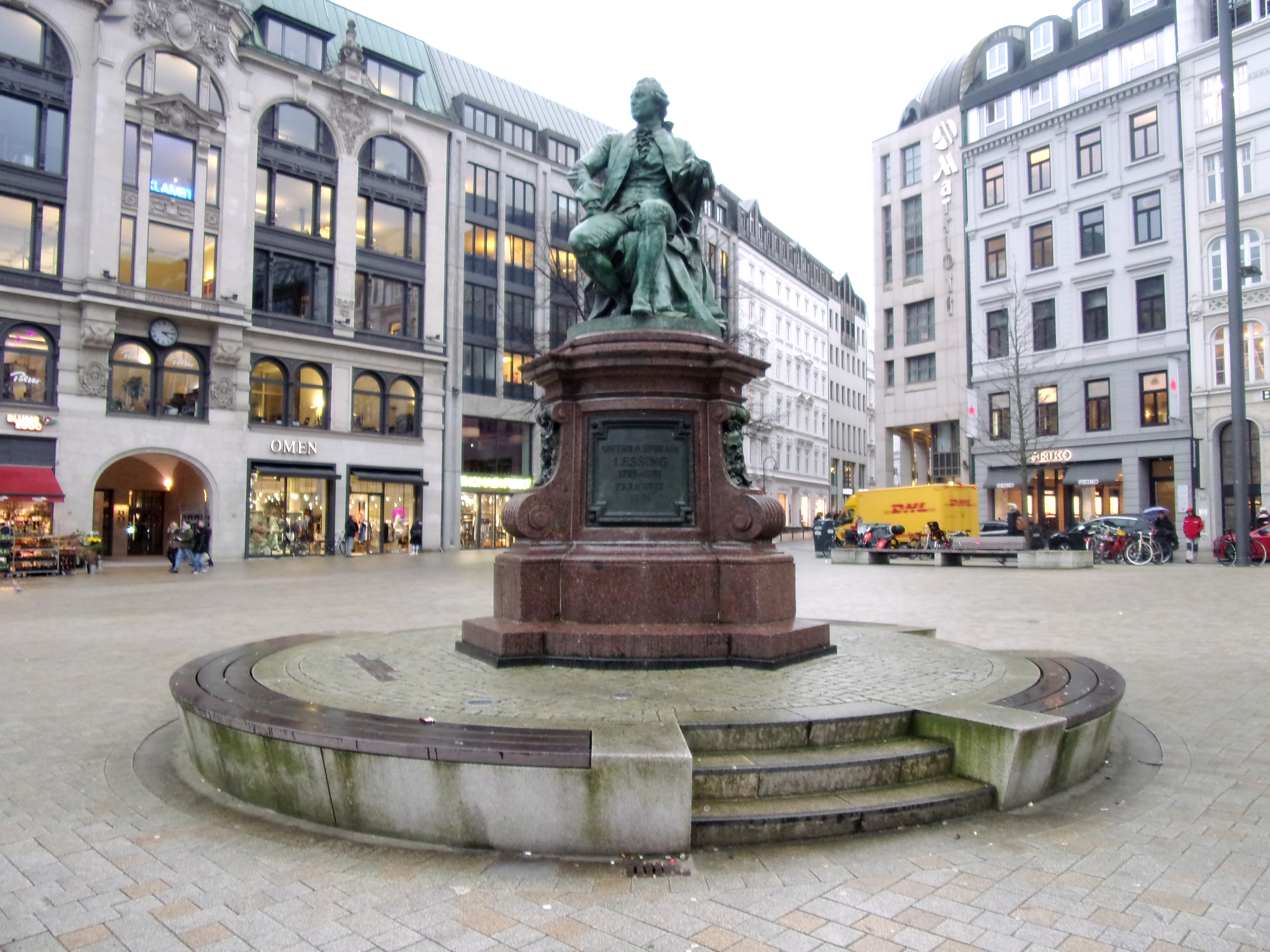 Nach Neupflasterung des Gänsemarktes befindet sich nun das Lessing-Denkmal an einem leicht in Richtung Dammtorstraße versetzten Standplatz. Das Fundament bekam außerdem eine umlaufende Sitzbank. Foto Februar 2018. This is a photograph of an architectural monument.